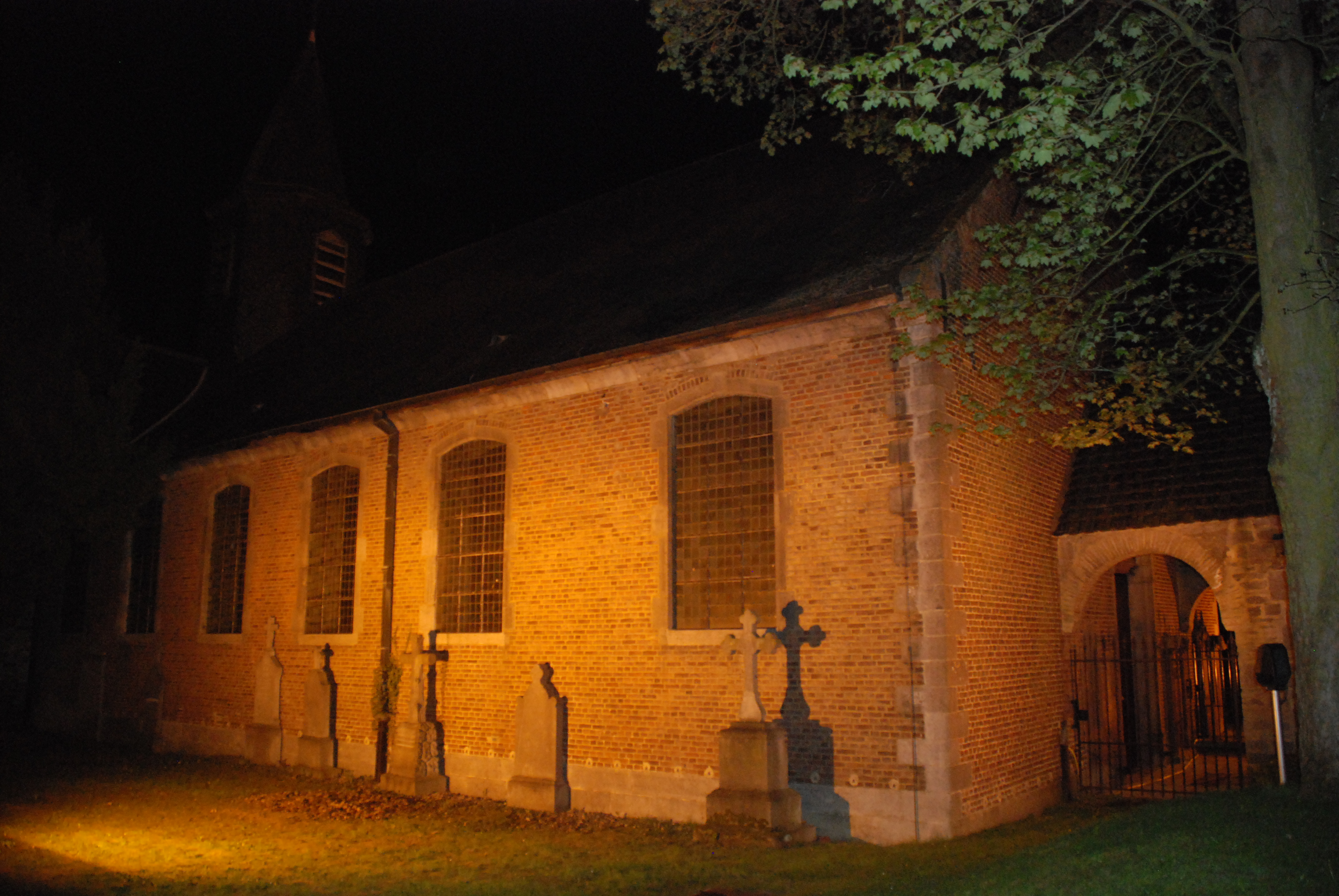 Belgique - Brabant wallon - Ottignies - Église Notre-Dame de Mousty